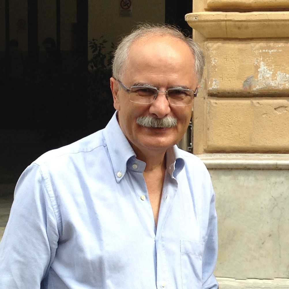 Pietro Greco